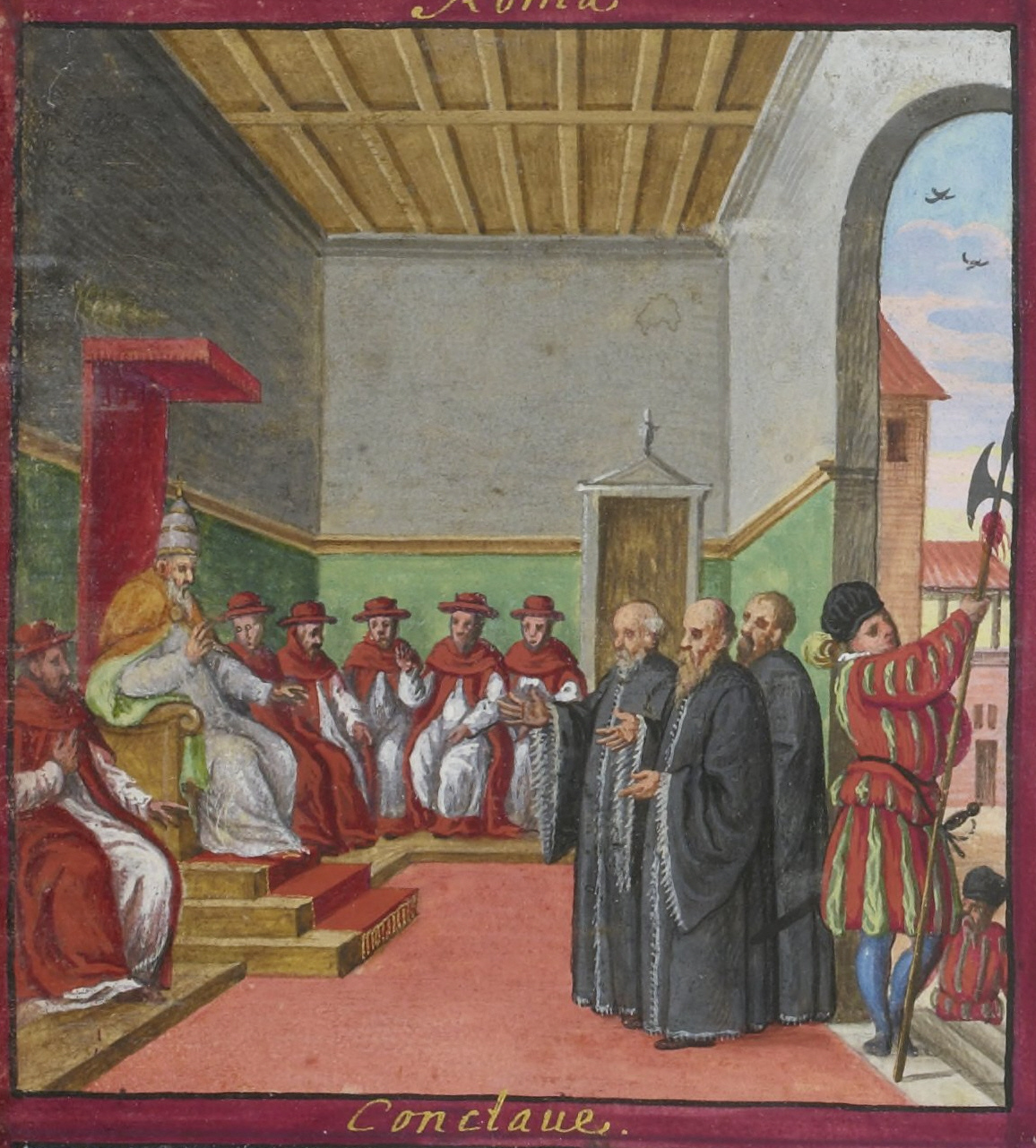 Voyages et aventures de Ch. Magius, Bibliothèque nationale de France, département Estampes et photographie, RESERVE 4-AD-134, detail de la miniature no. 9; conclave et audience de Magius